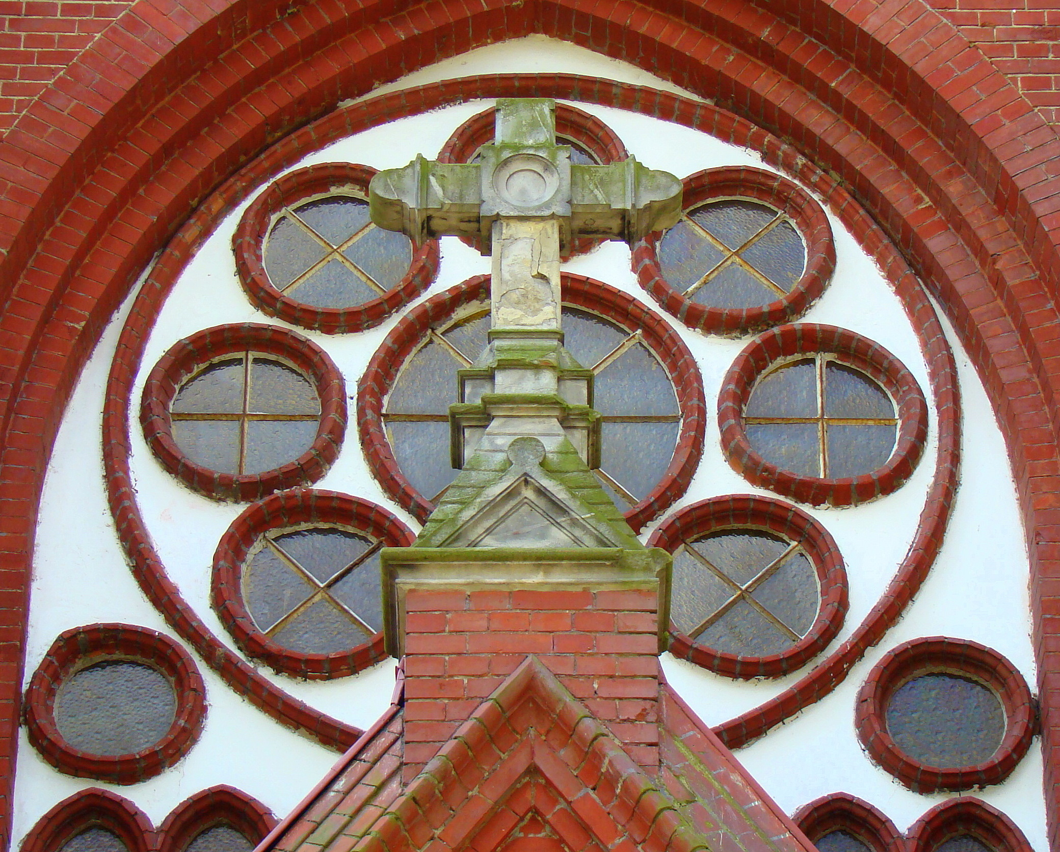 Kościół Niepokalanego Poczęcia NMP w Policach (krzyż nad wejściem głównym), Polska